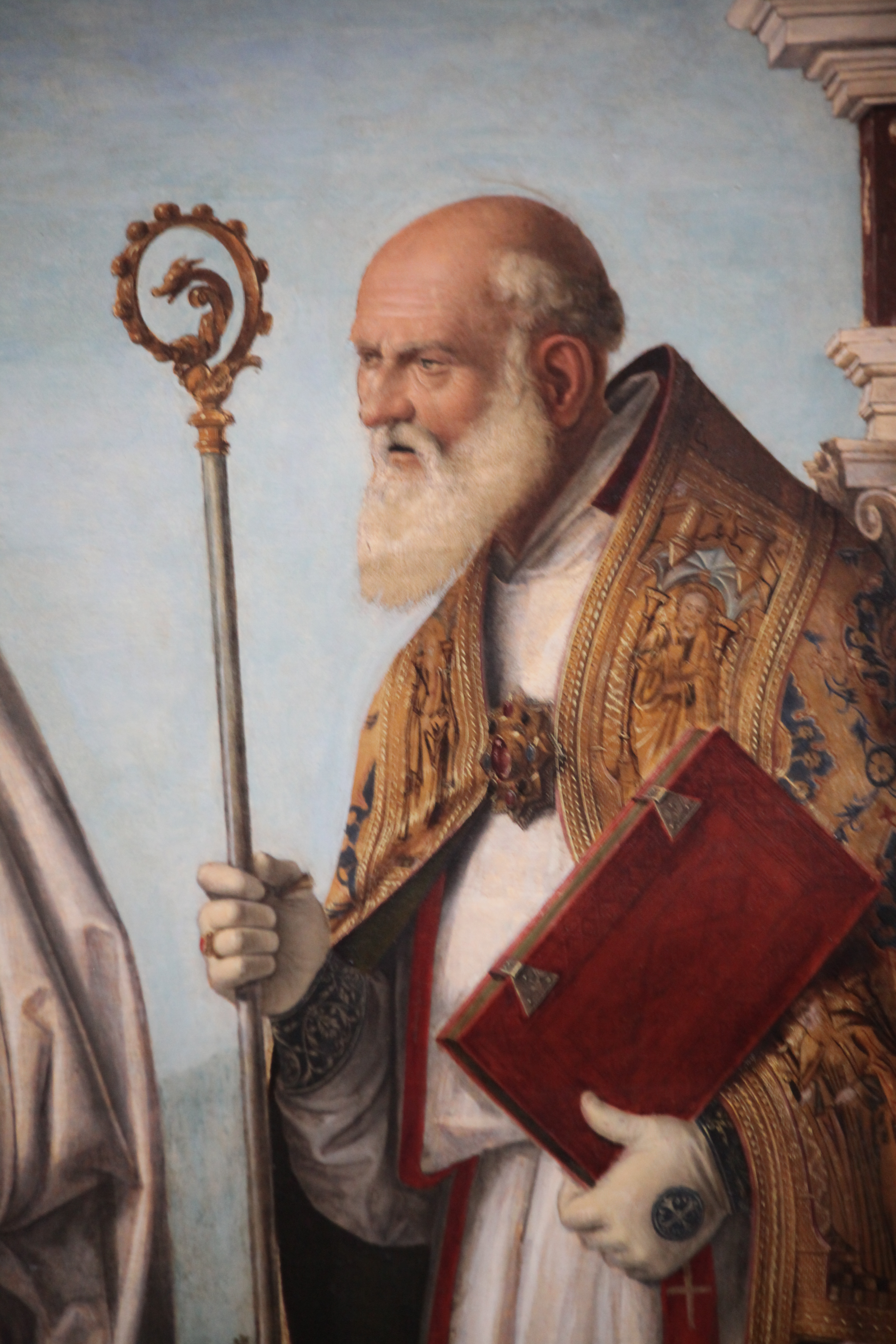 Gallerie dell'Accademia - MIBAC This is a photo of a monument which is part of cultural heritage of Italy.